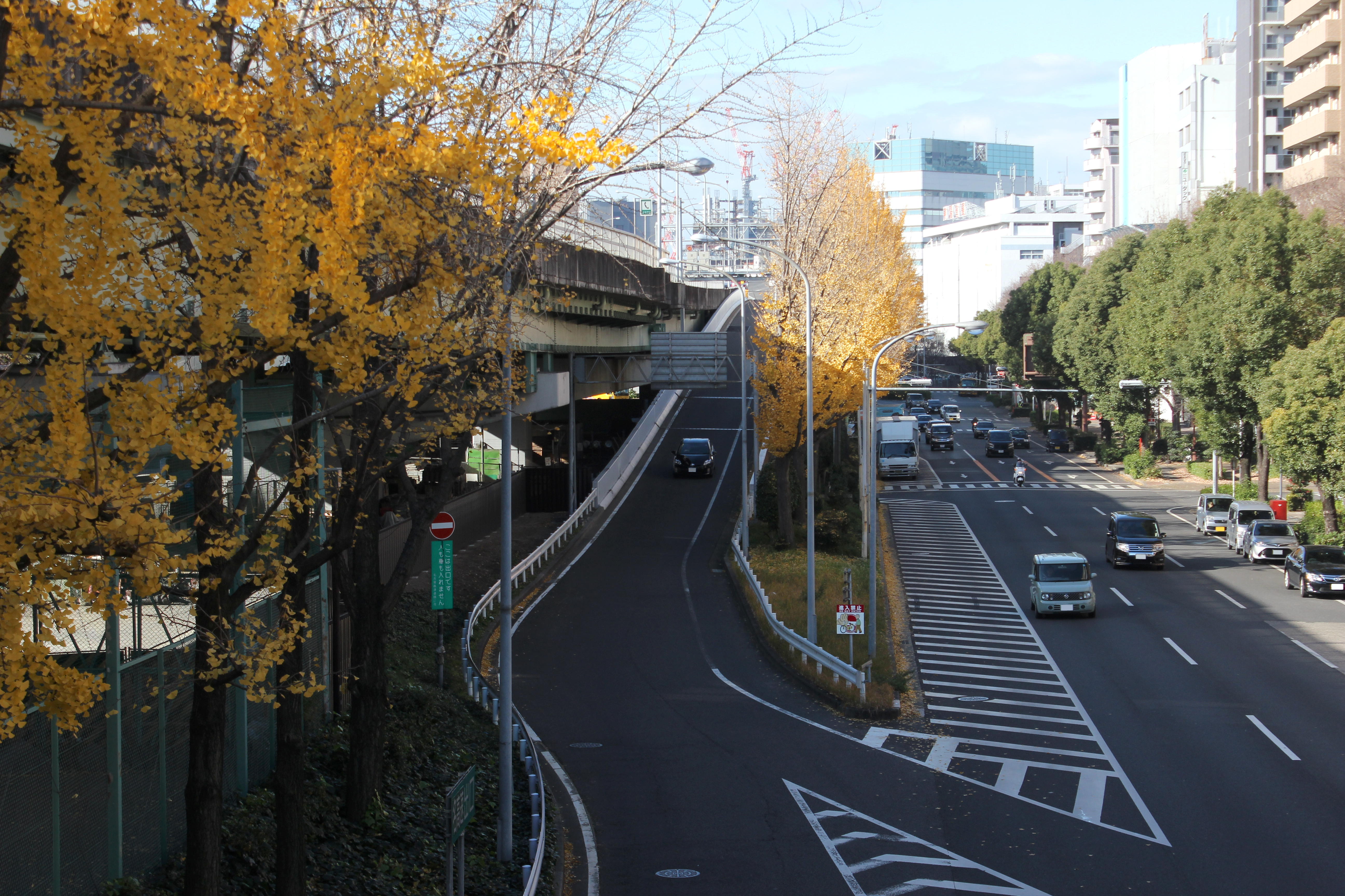 名高速 白川出入口と若宮大通